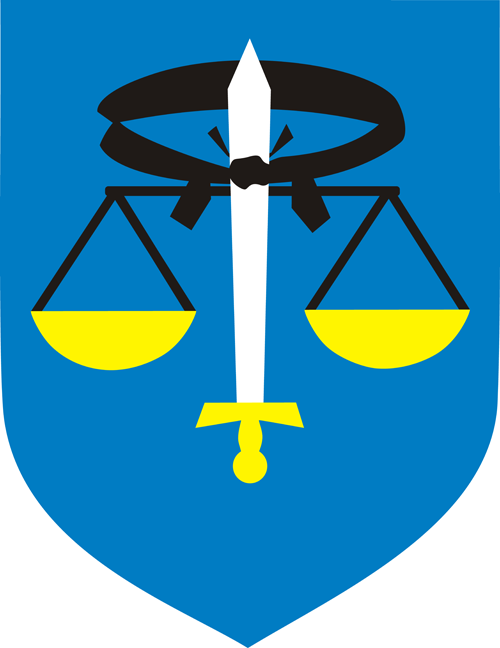 herb Sierakowa Śląskiego